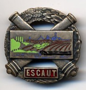 Insigne secteur fortifié de l'Escaut (1er modèle)